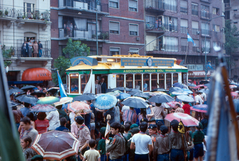 El 15 de noviembre de 1980, en el marco de los festejos de los 400 años de Buenos Aires